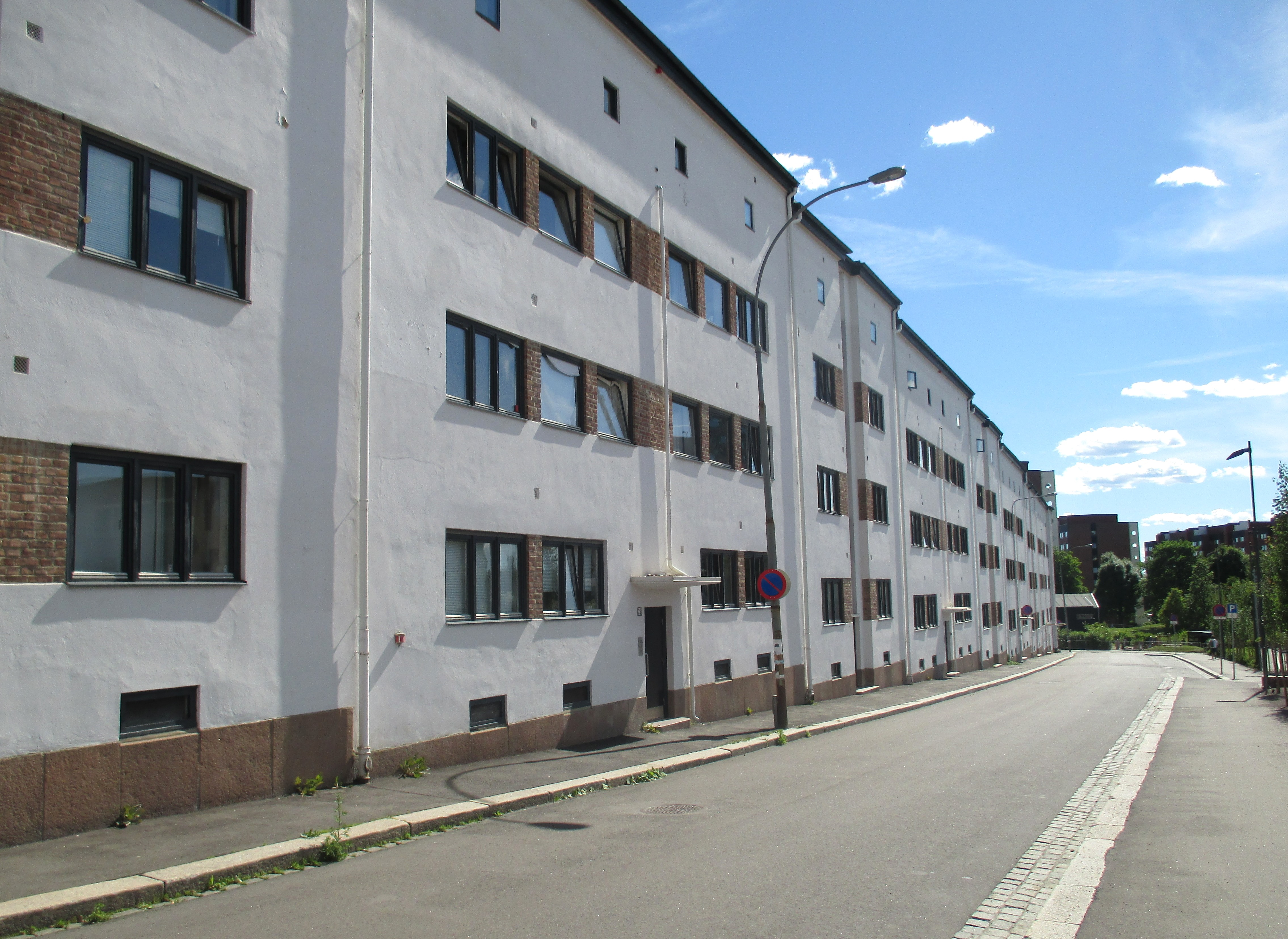 Carl Jeppesens gate på Sandaker i Oslo